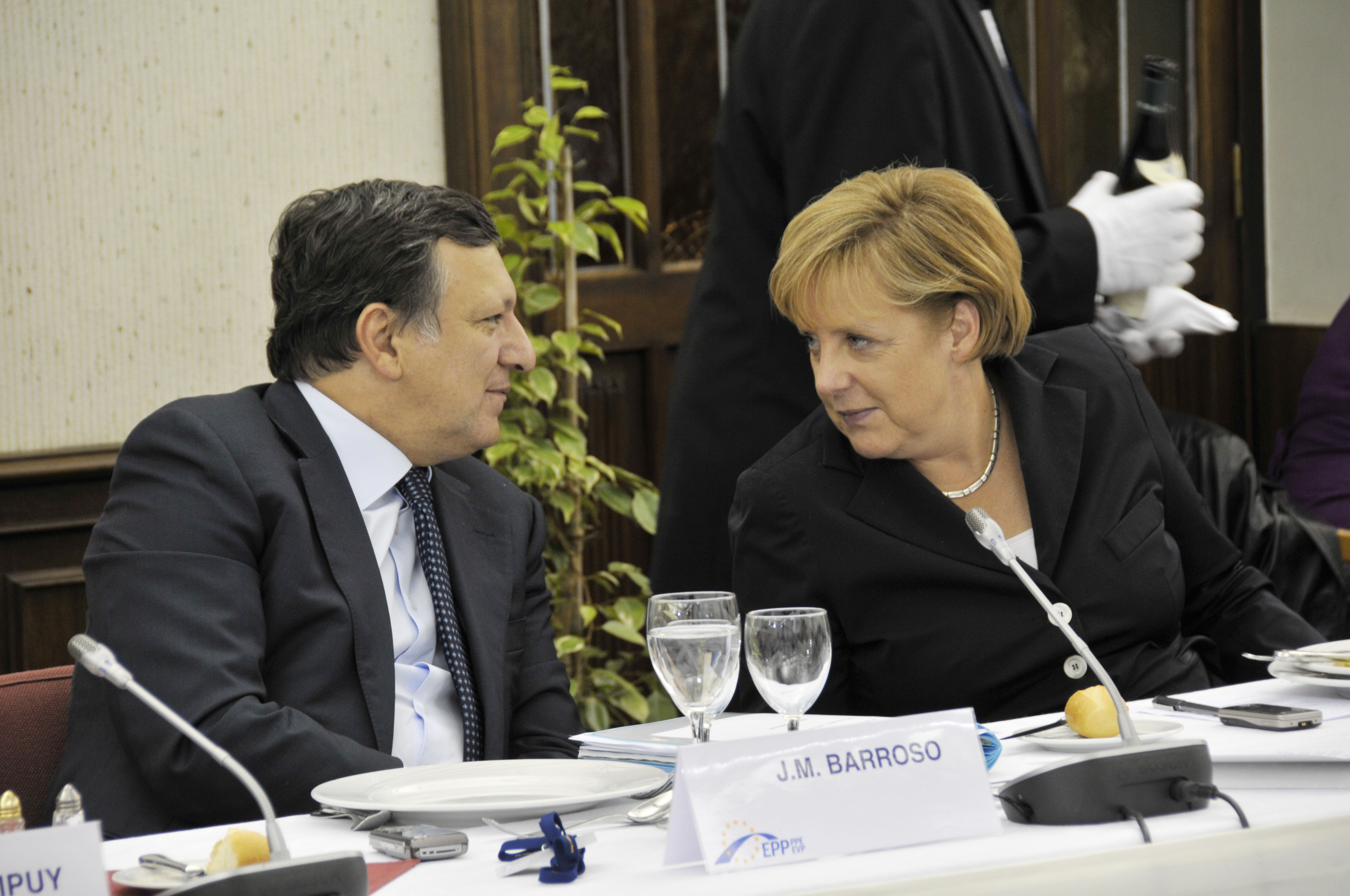 EPP Summit September 2010 (53)